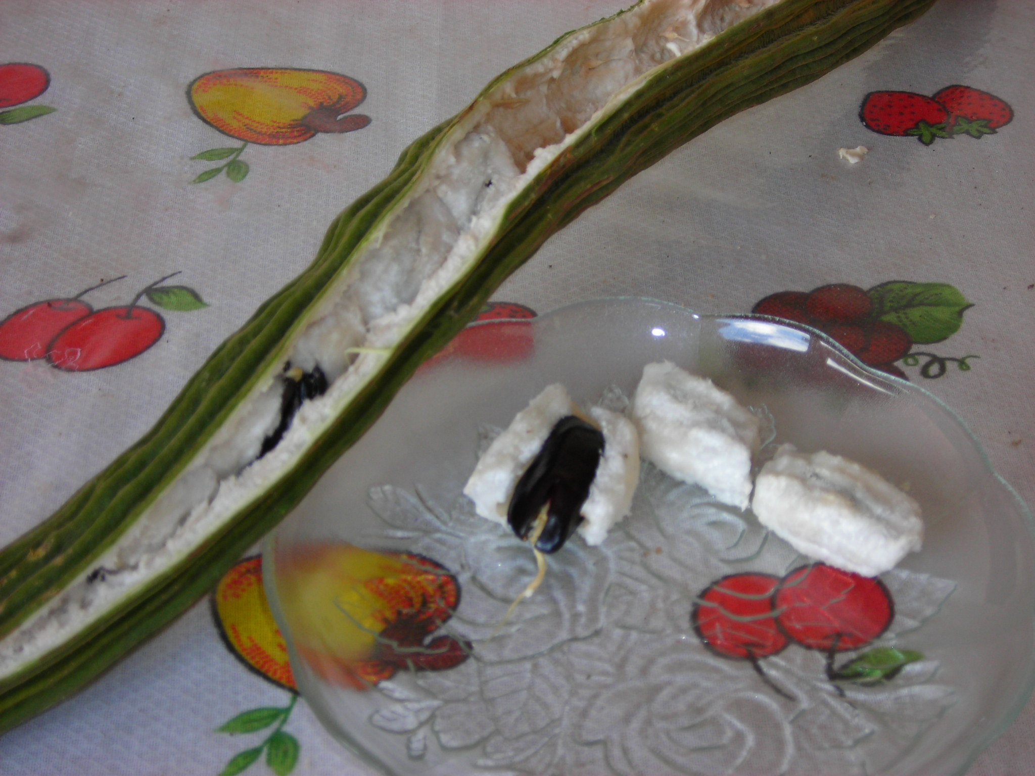 Ingá-cipó, Inga edulis